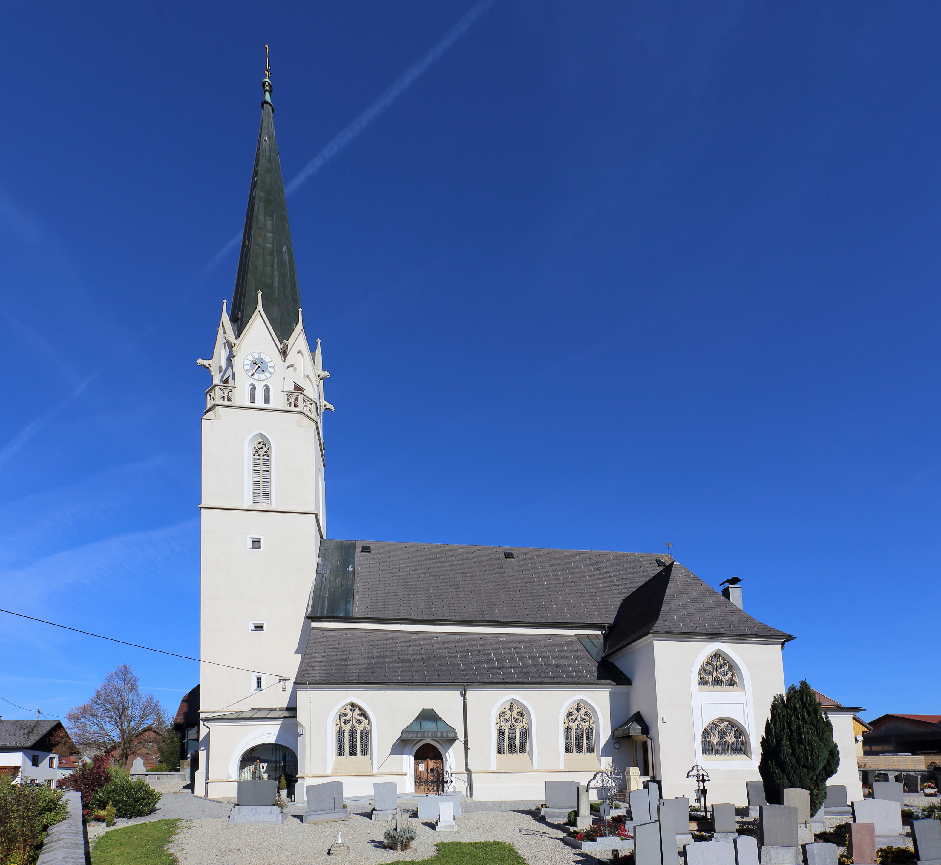 Die katholische Pfarrkirche Mariae Himmelfahrt der oberösterreichischen Gemeinde St. Marienkirchen am Hausruck. Ein gotischer Sakralbau, wobei dem Turm ein neugotischer Spitzhelm aufgesetzt wurde. Die Ausstattung ist vorwiegend neugotisch.